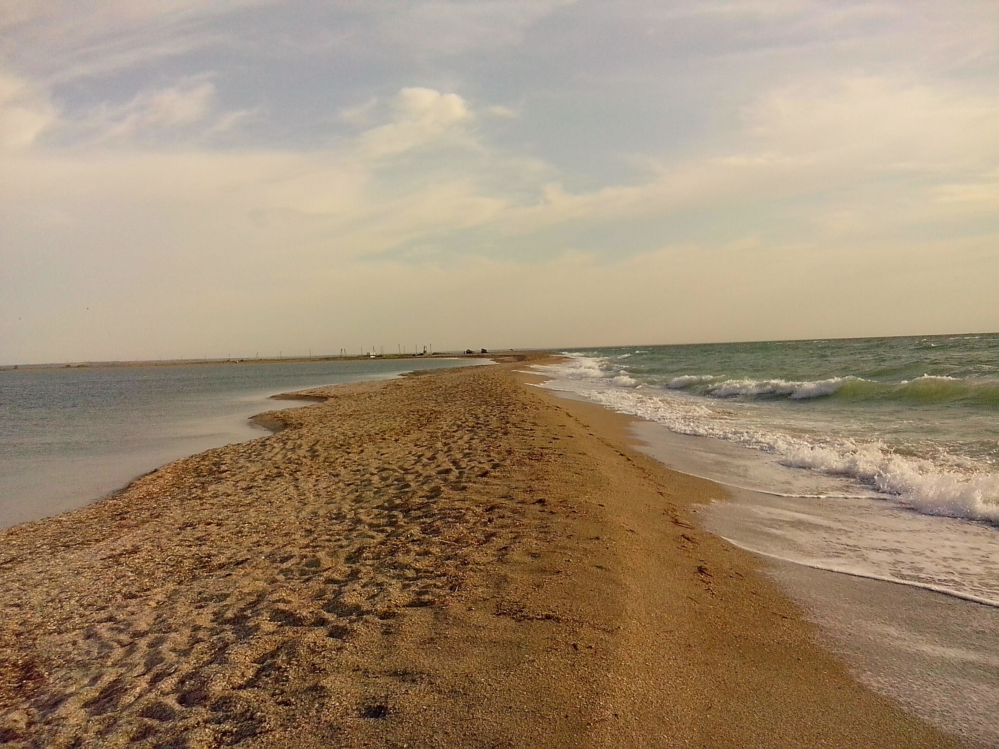 Бакальська коса, Роздольненський р-н с. Стерегуще